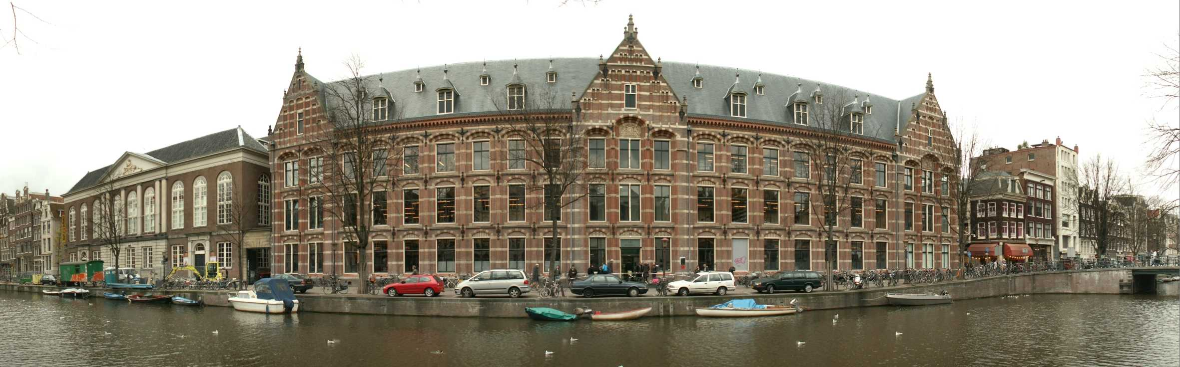 Bushuis Amsterdam aan de Kloveniersburgwal. rechts de bushuissluis (brug 224)